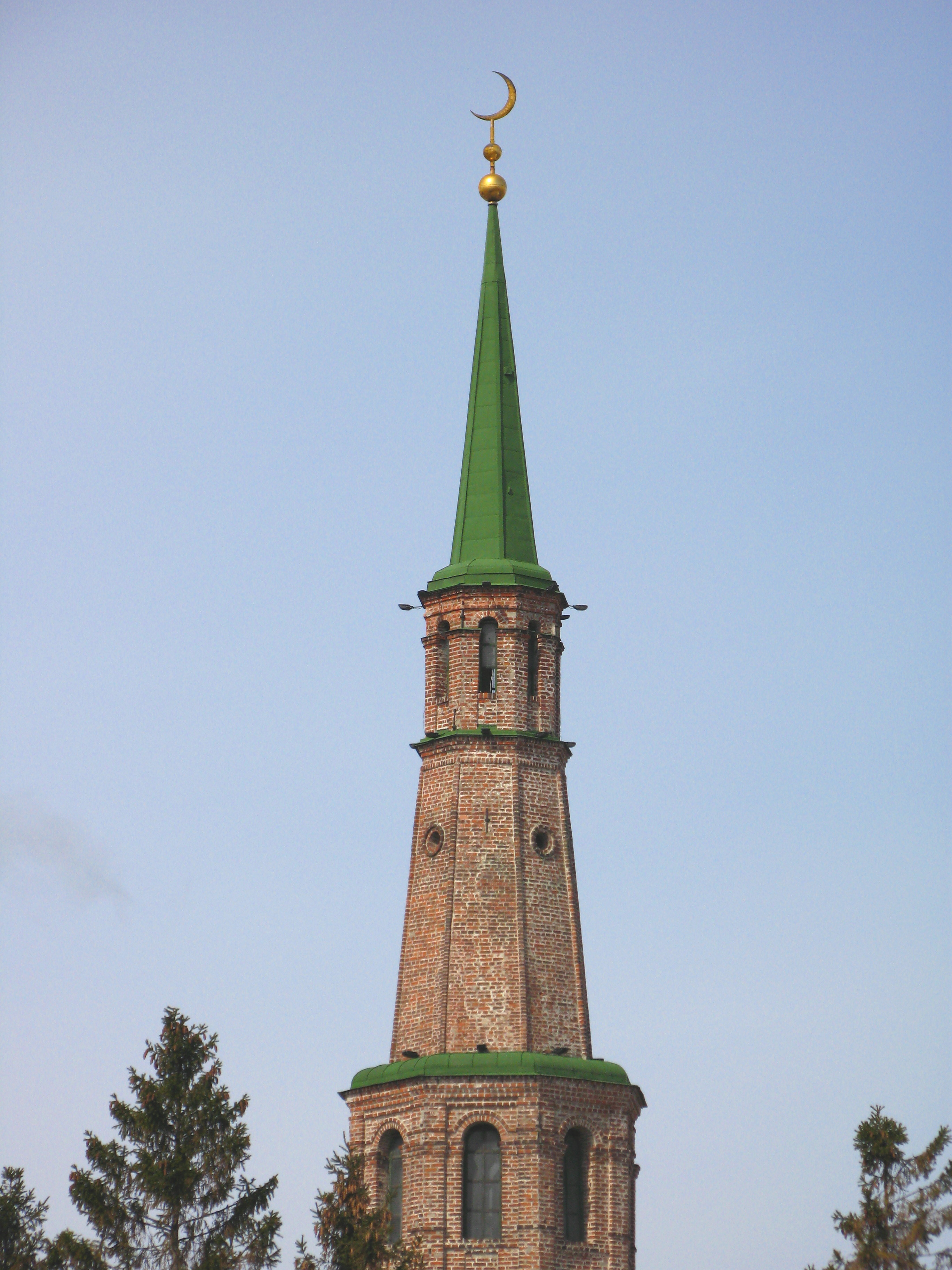 Сјујумбике торањ. Казањ, Русија.